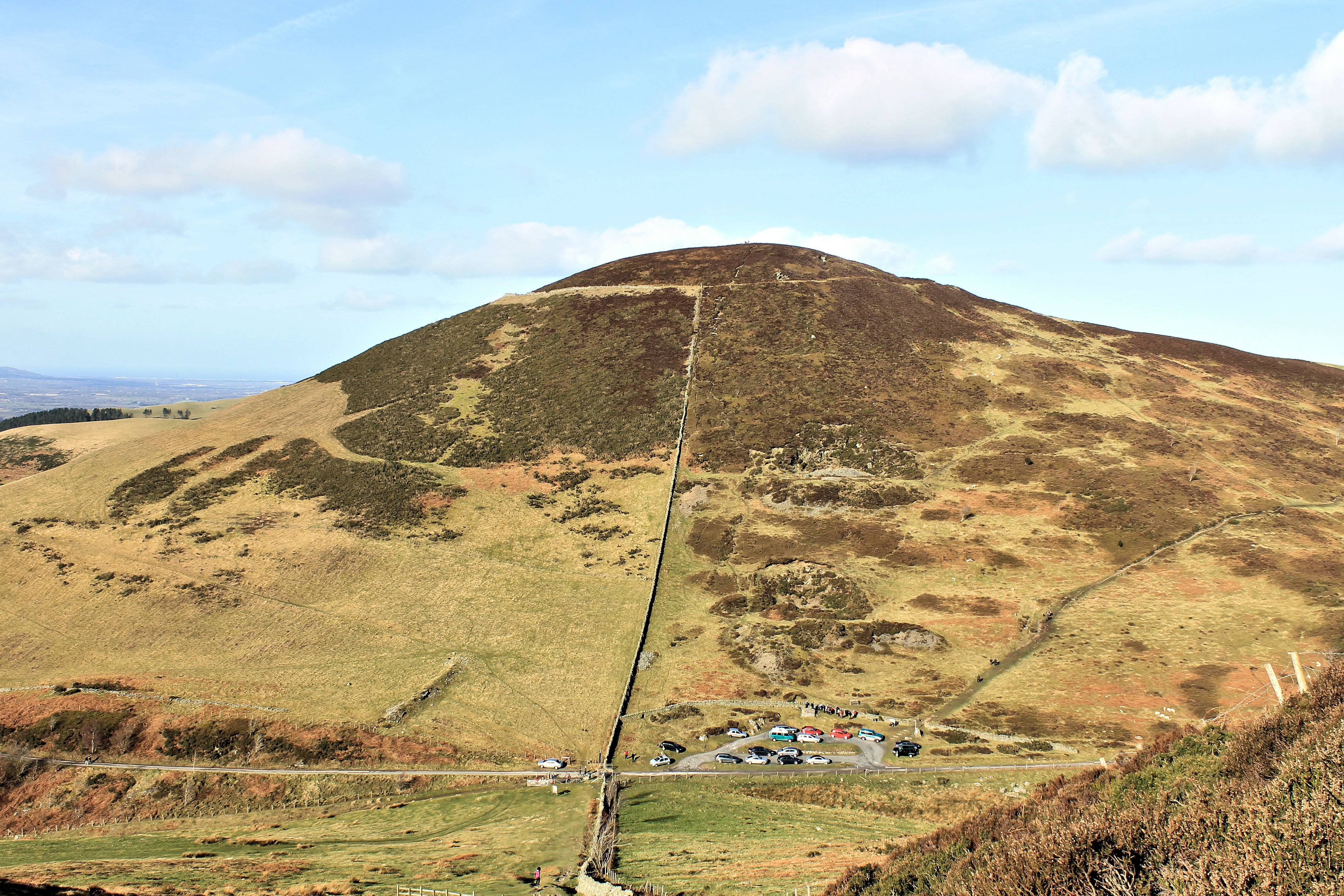 Moel Arthur, Sir Ddinbych o Foel Llys y Coed.